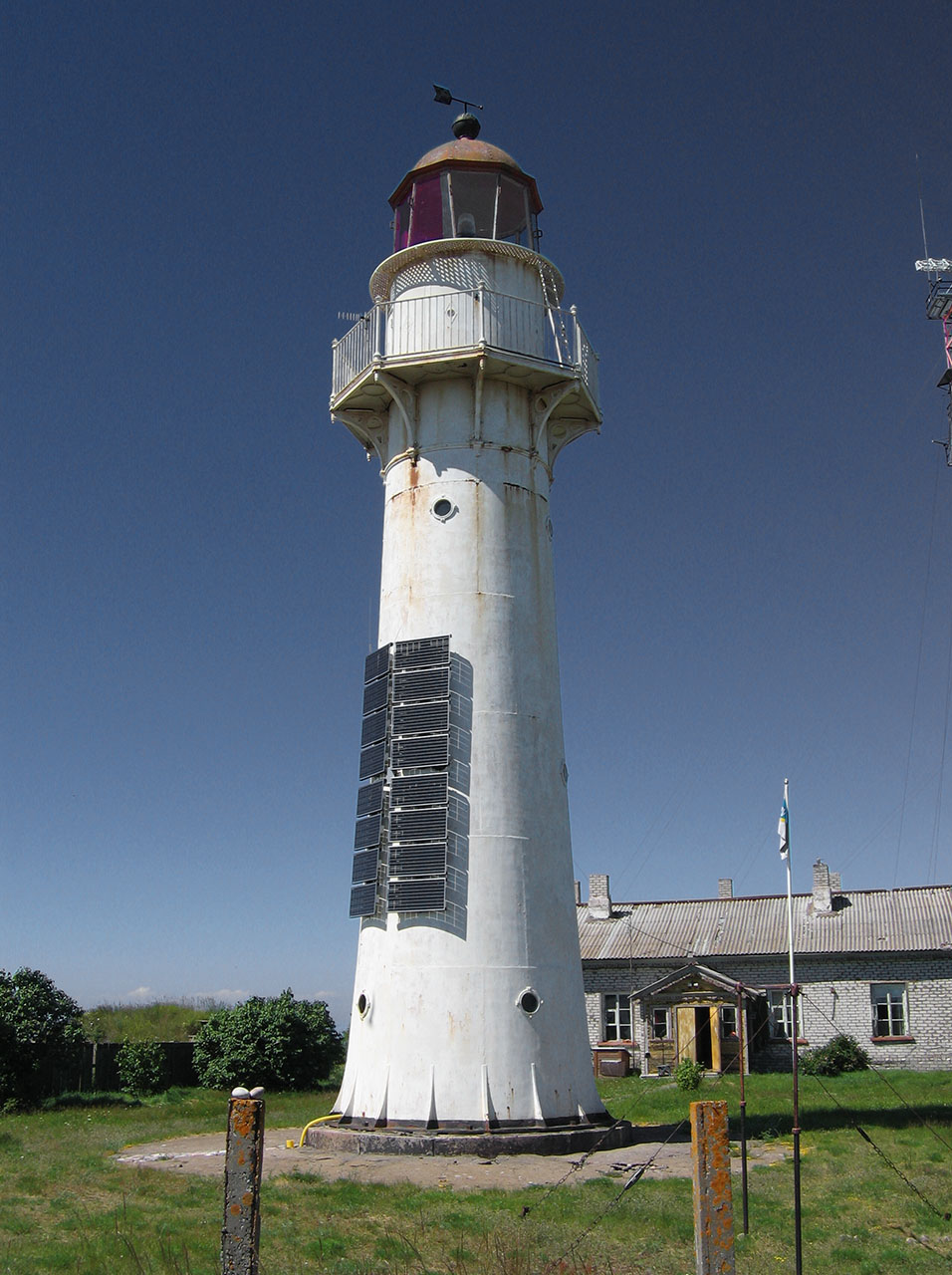 Vaindloo tuletorn